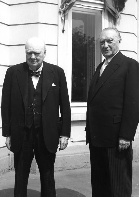 Bundeskanzler Konrad Adenauer empfing den ehemaligen britischen Premierminister Sir Winston Churchill am 12.5.1956 zu einem Gespräch im Bundeskanzleramt